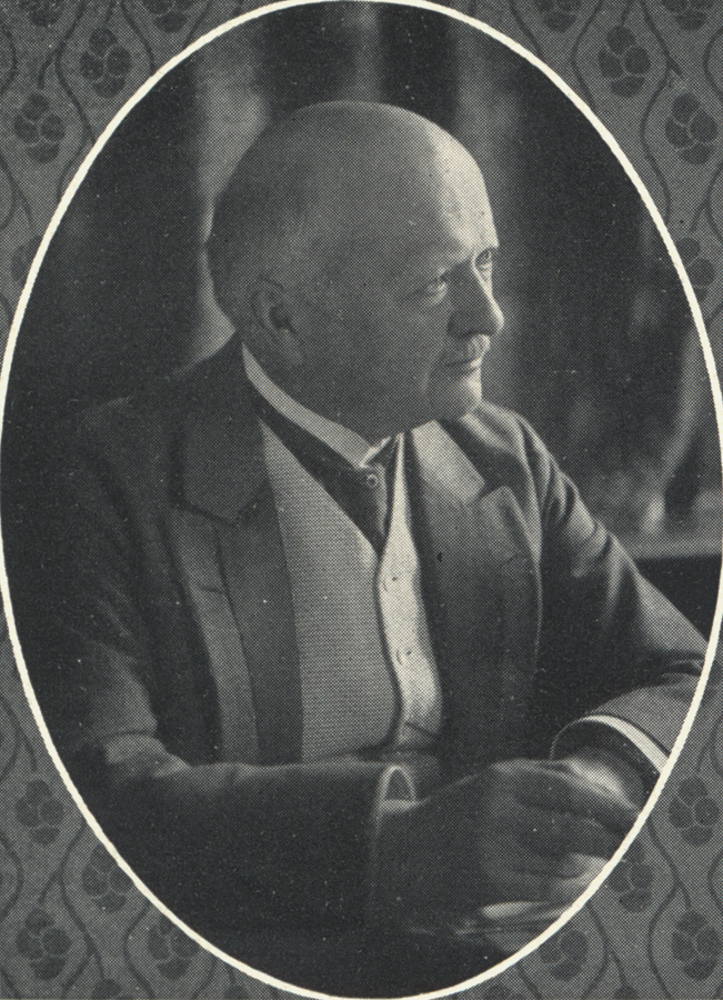 Foto des deutschen Juristen Erich Sello (1852-1912) von Wilhelm Fechner